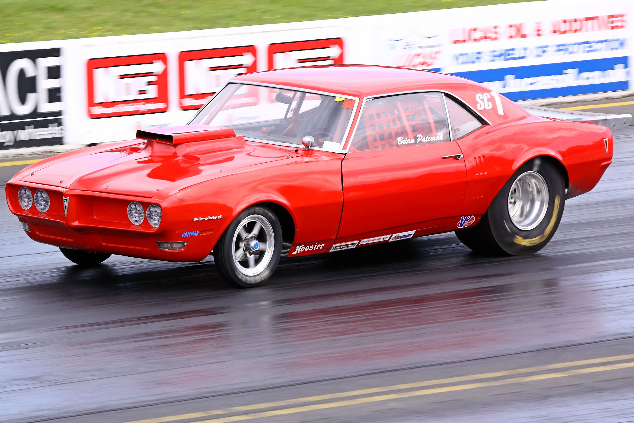 Super Comp - Pontiac Firebird - Santa Pod 2010